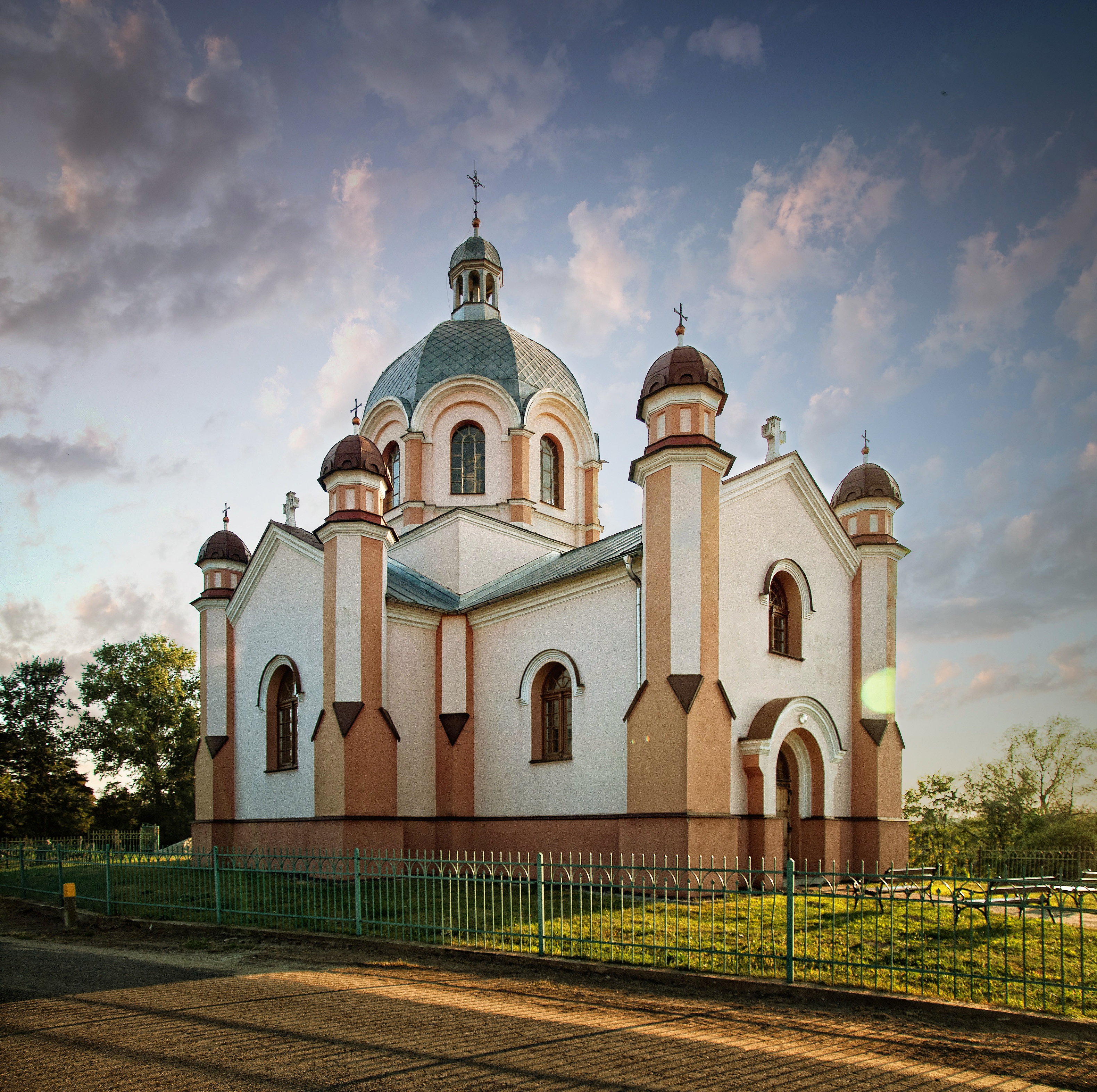 Kuryłówka, cerkiew gr.-kat., ob. kościół rzym.-kat. fil. p.w. św. Mikołaja, 1896